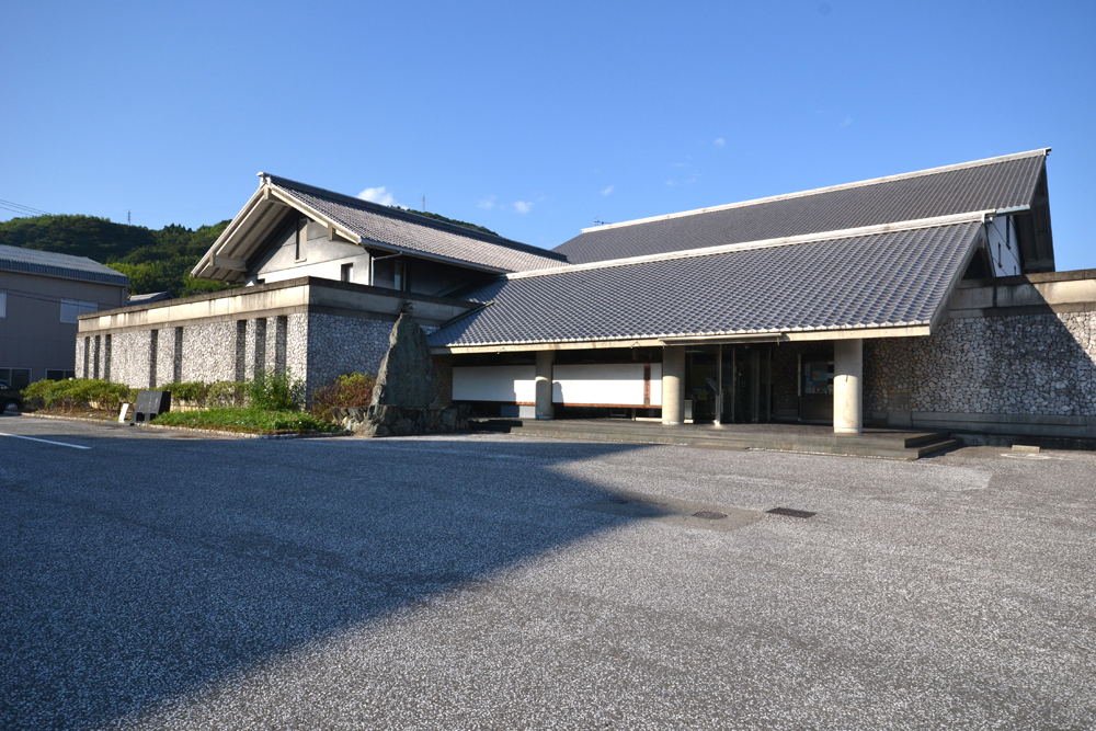 高知県いの町紙の博物館